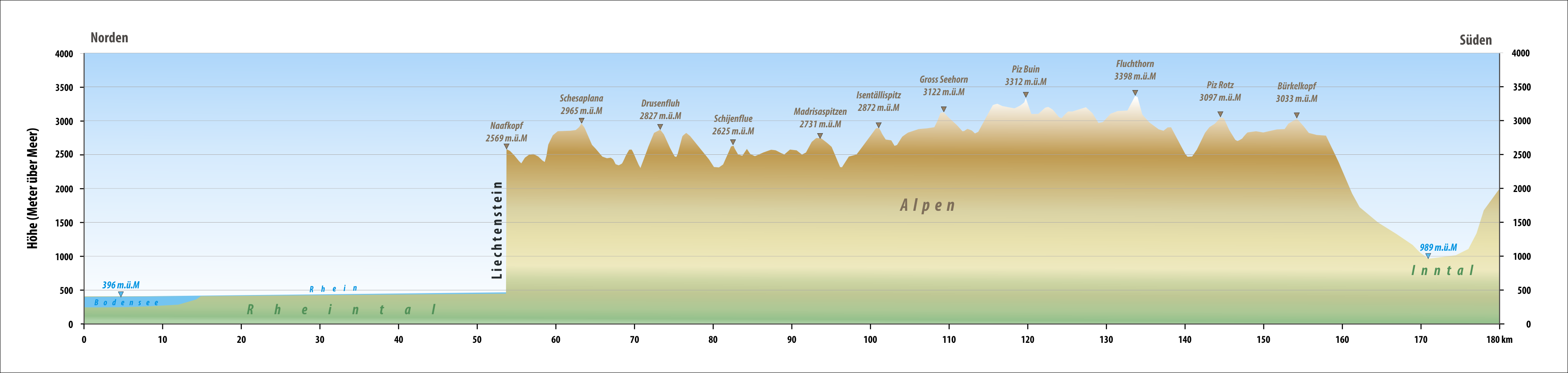 Diagramm des Grenzverlaufes zwischen der Schweiz und Österreich